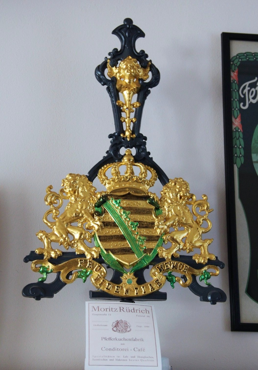 Hoflieferantenschild vom ehemaligen Pulsnitzer Pfefferküchler Moritz Rüdrich